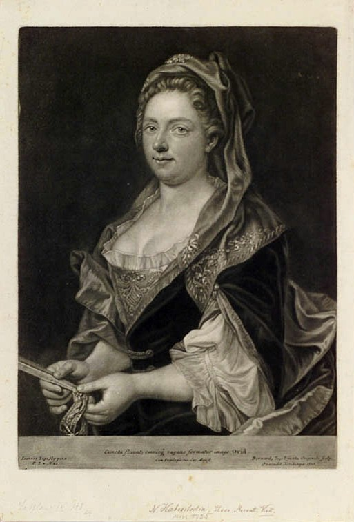 "Female Portrait"